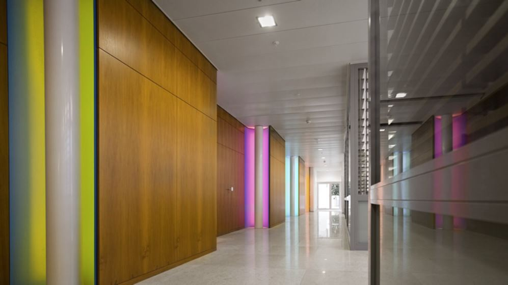 Kunst und Raum, "Mixed Colours", 12 Lichtpilotis, F. Hoffmann - La Roche AG, Basel, 2008